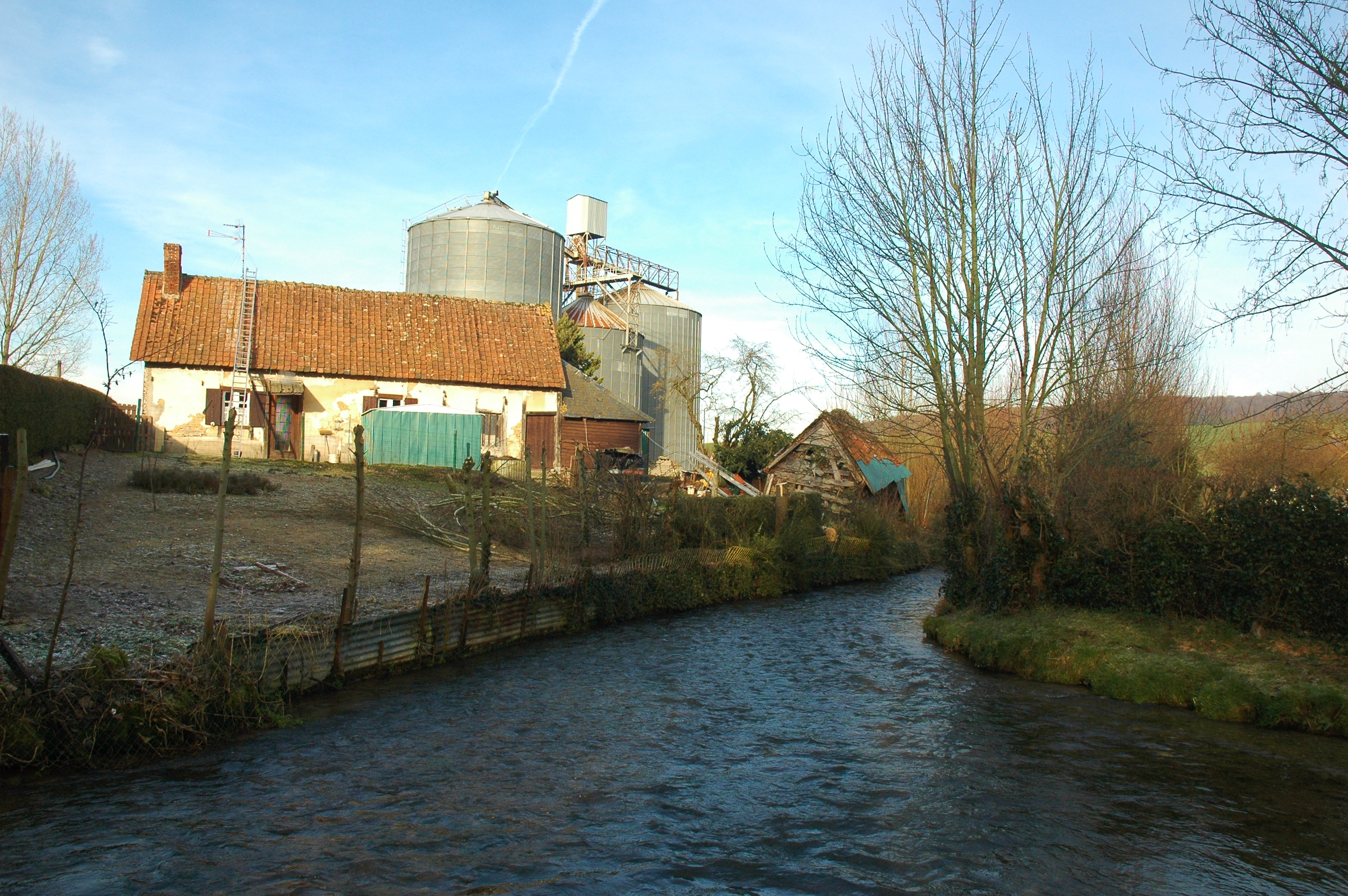 Grandcourt (Seine-Maritime, France). L'Yères, à proximité du silo de Grandcourt.